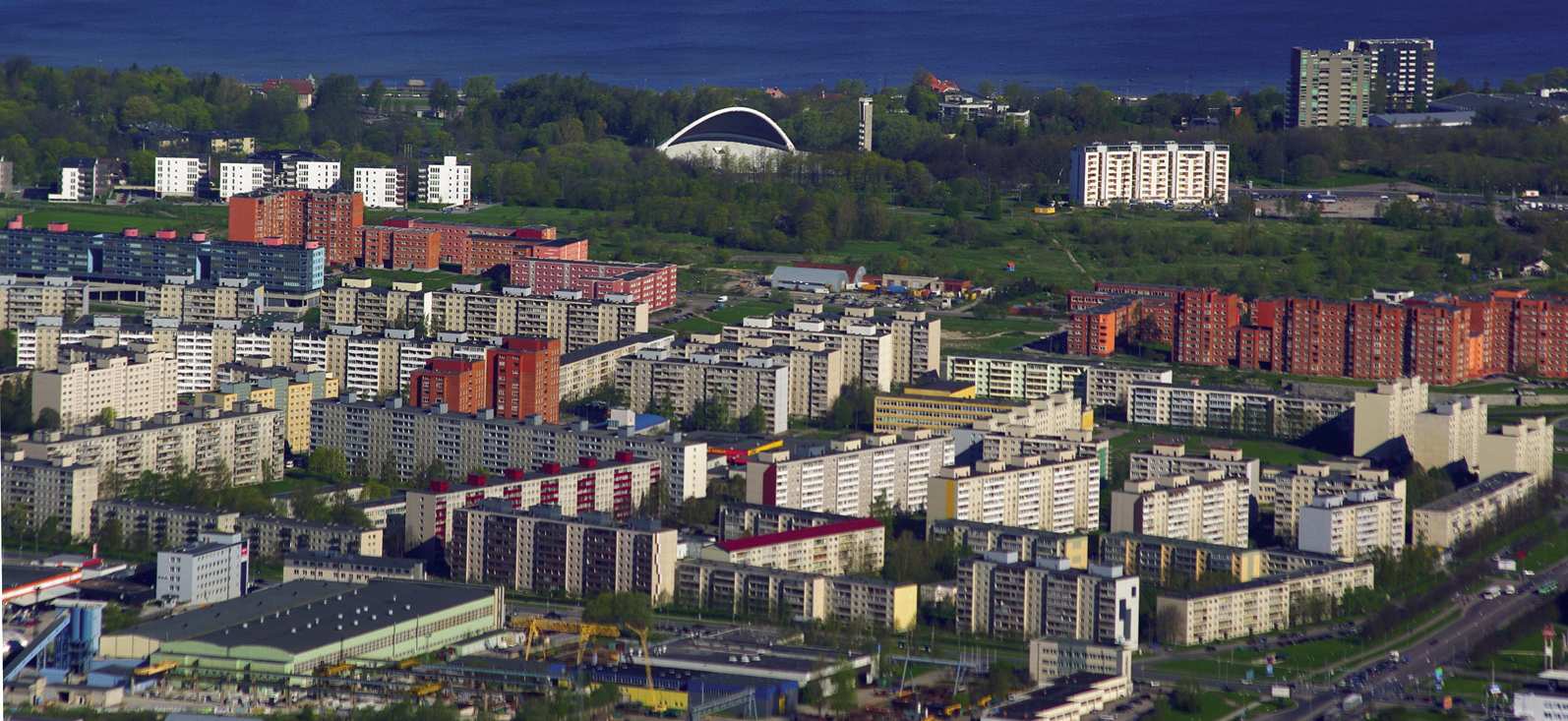 Õhuvaade Pae asumile